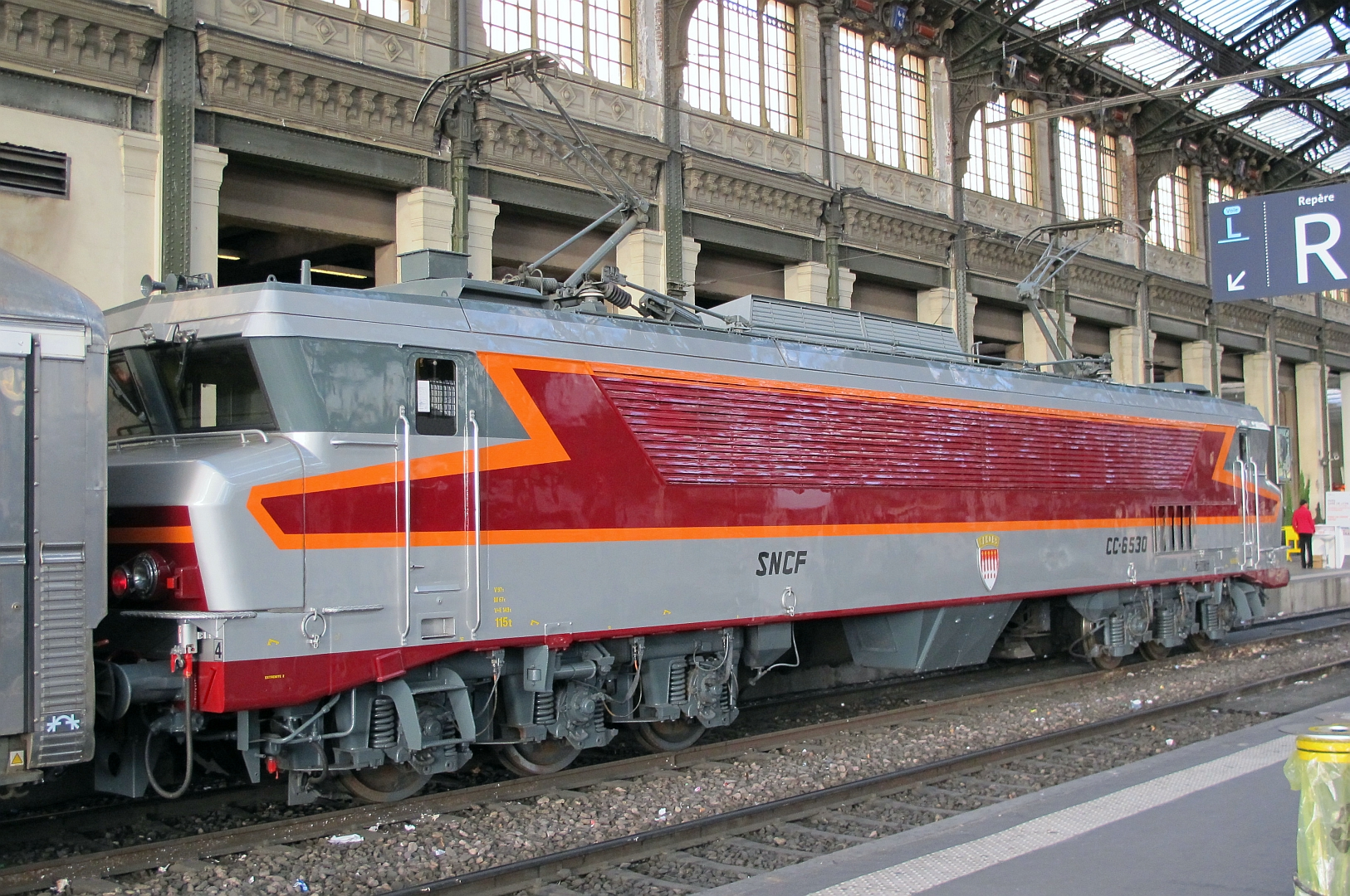 La CC 6530 en gare de Paris-Lyon le 15 septembre 2013.